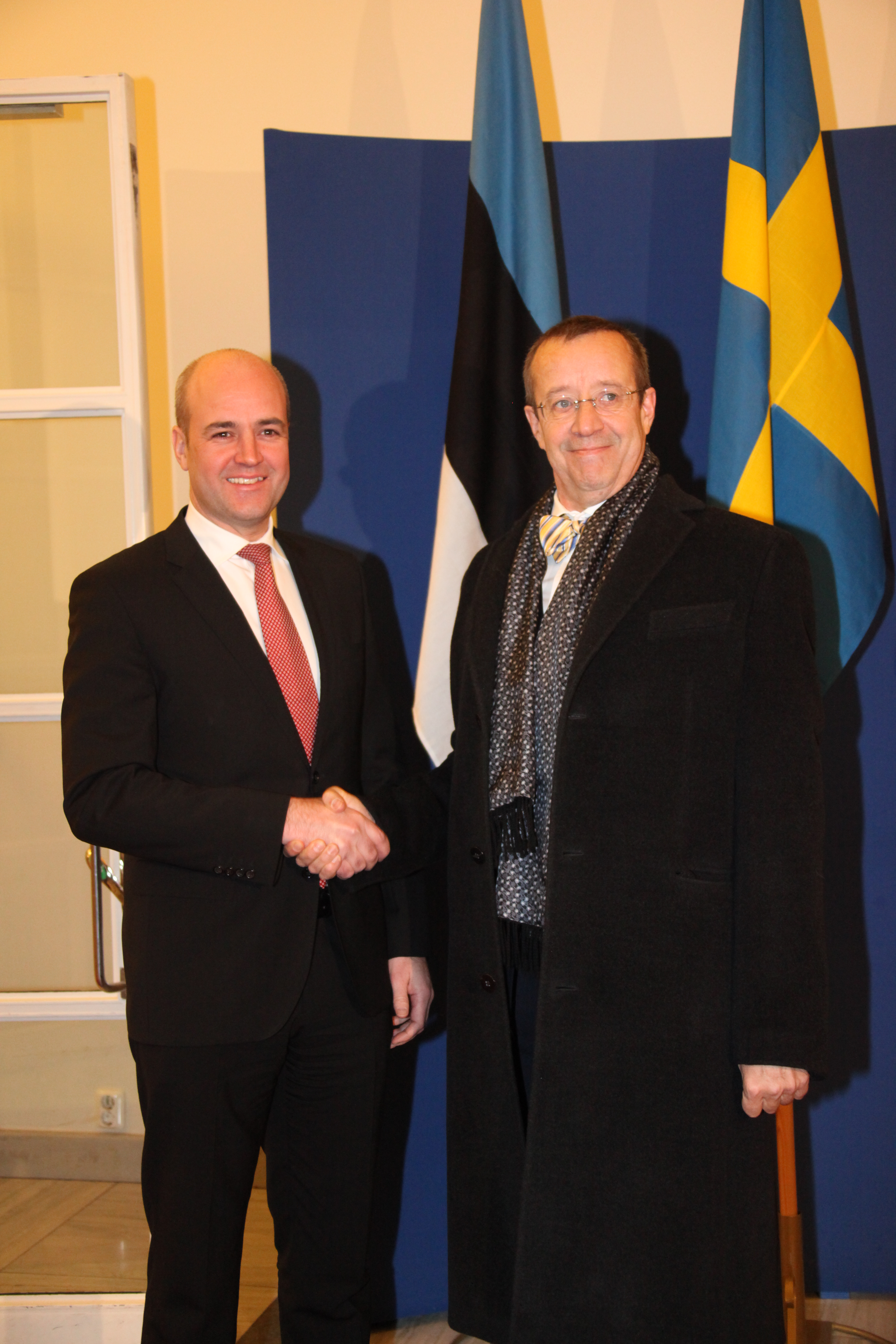 State visit to Stockholm, Sweden, 19-19-20-january-2011